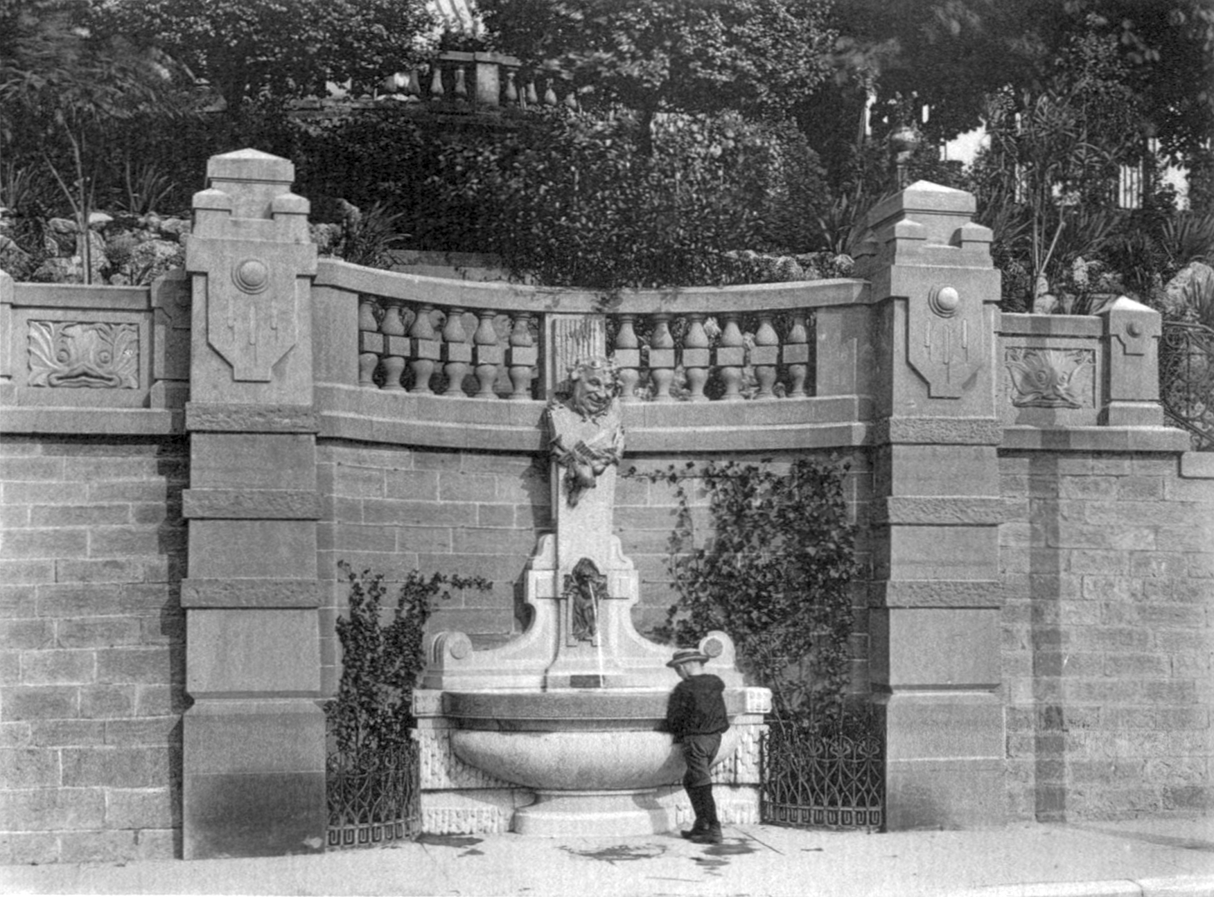 Froschbrunnen in Stuttgart an der Haußmannstraße 36, 1900. Hinten: Villa Wirth.